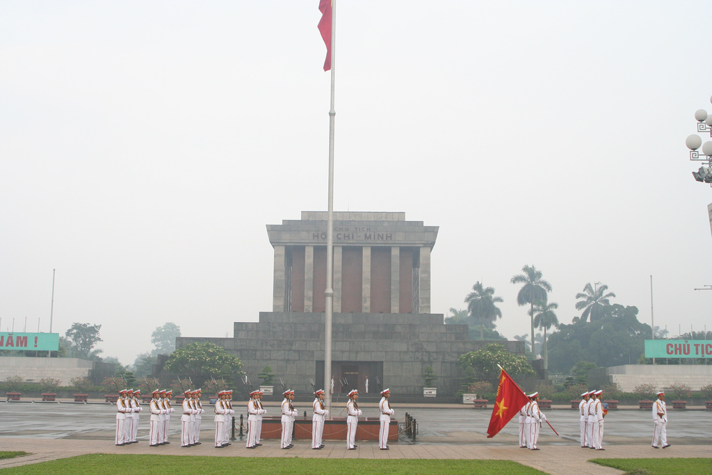 Ho Chi Minh Mausoleum at Ba Dinh Square.